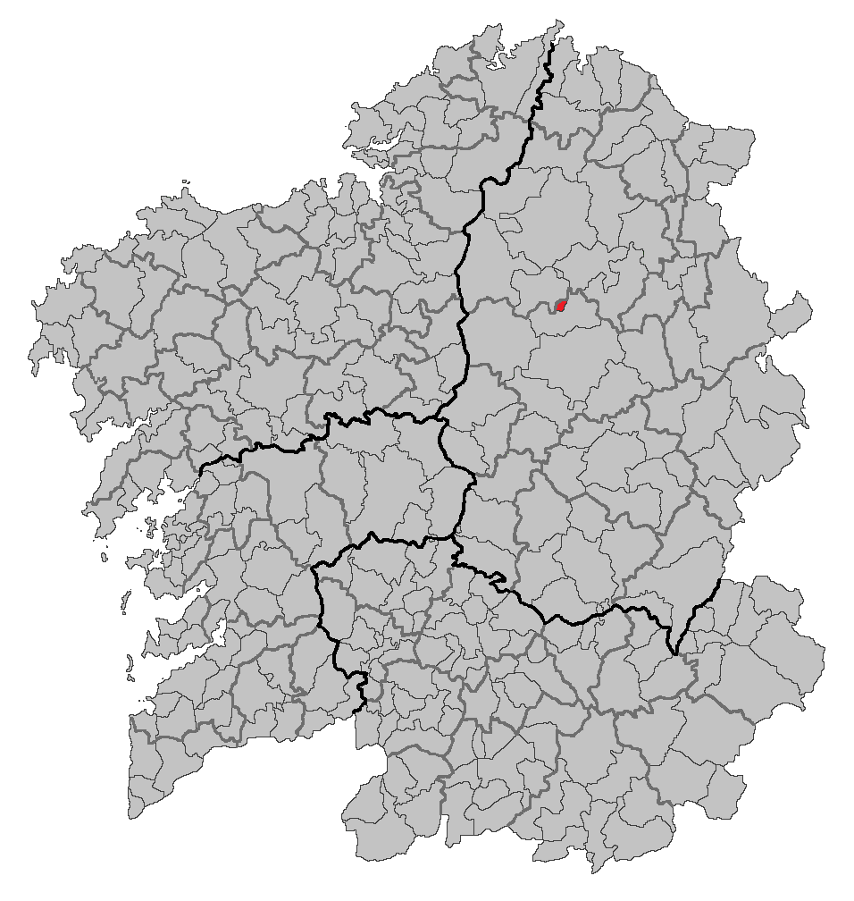 Mapa coa localización do concello de Rábade.